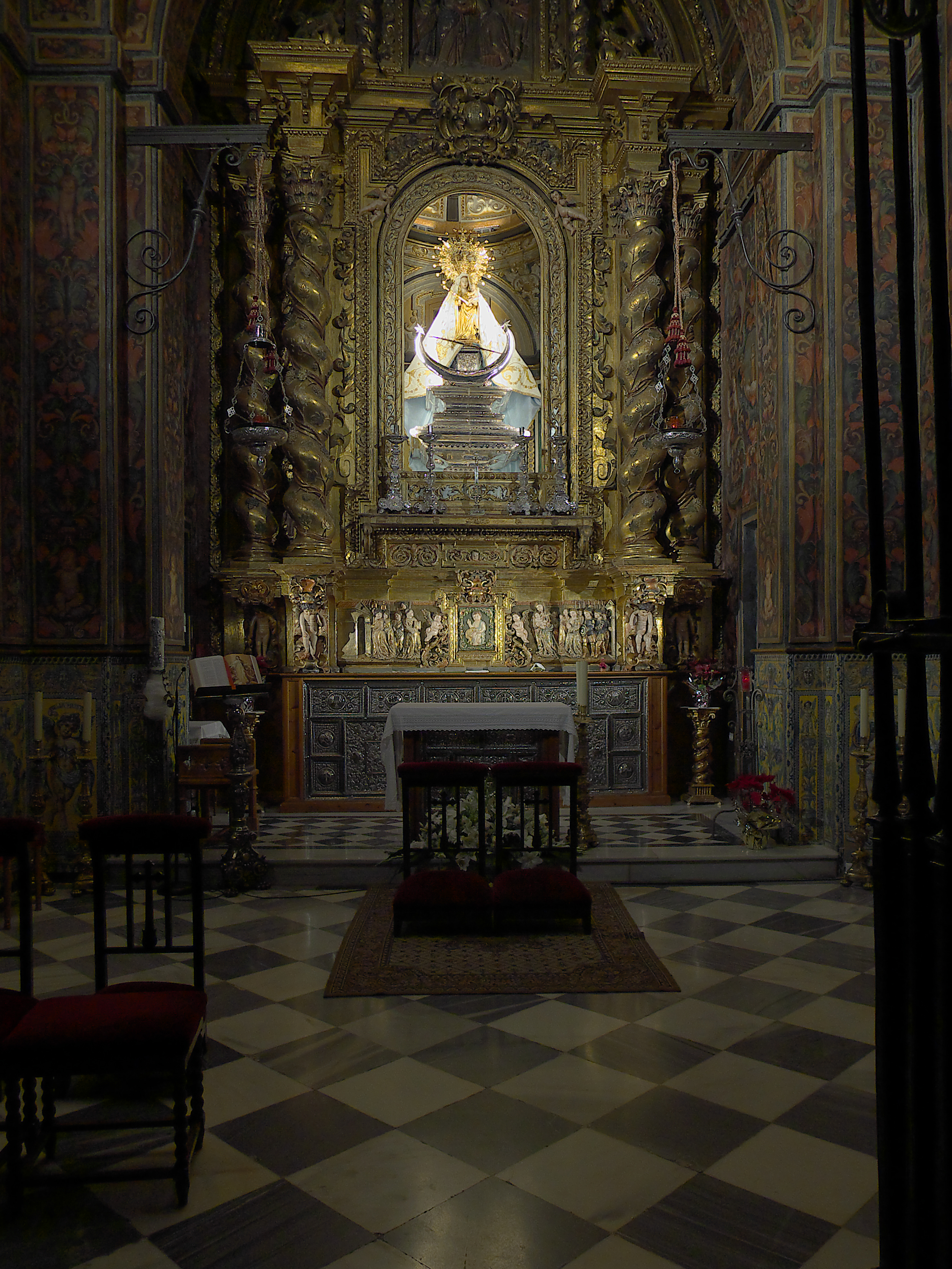 Capilla de la Virgen de la Capilla. Primitiva capilla y origen de la posterior iglesia. La imagen (s. XVI) en patrona de la ciudad de Jaén y titular de la Cofradía de Nuestra Señora de la Capilla.